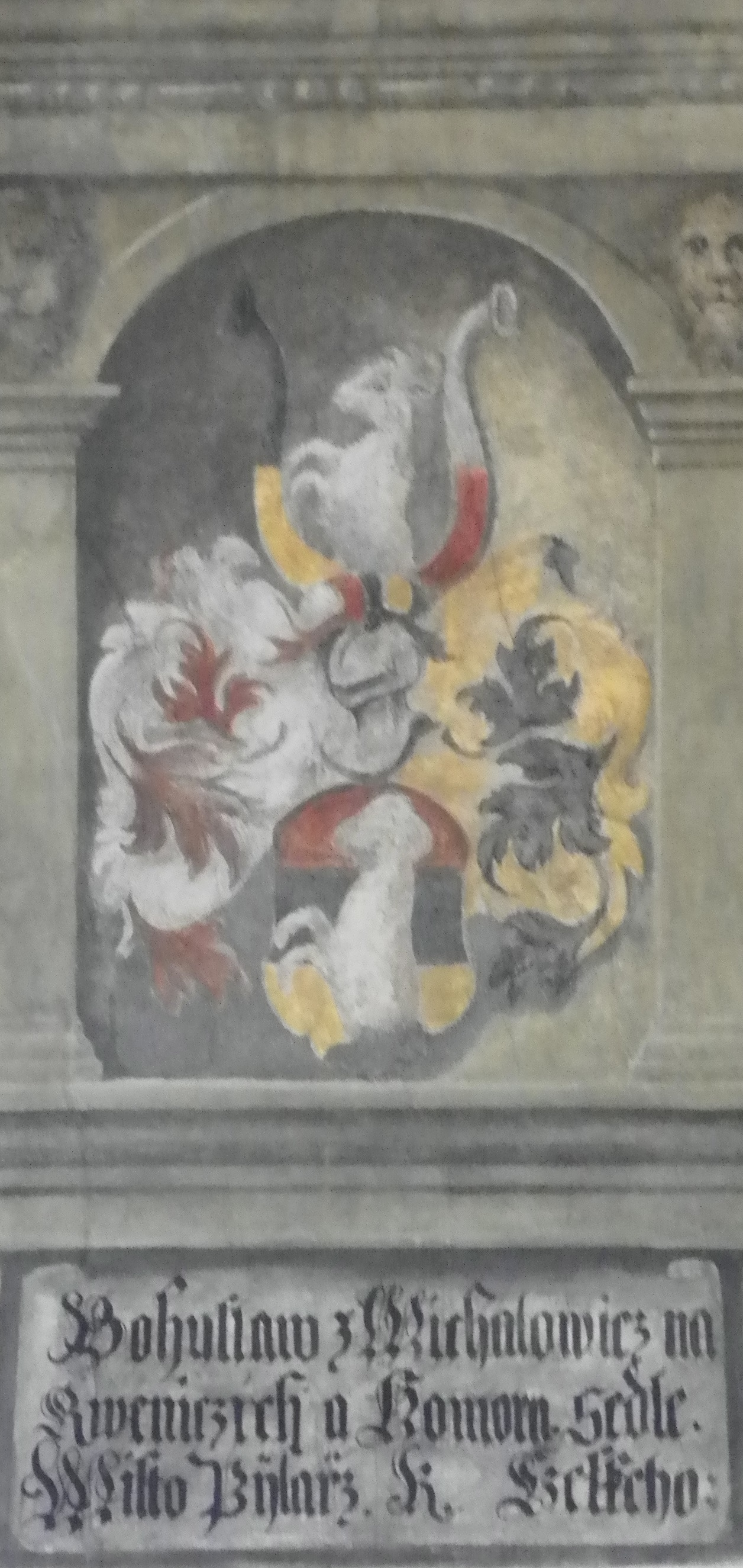 Znak a titul Bohuslava z Michalovic z roku 1605 na stěně místnosti zemských desek ve Starém královském paláci na Pražském hradě. Text pod znakem zní: Bohuslaw z Michalowicz na Rweniczích a Komorn. Sedle. Místo Pýsarž k. Czeskeho.